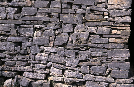 Parement de la façade d'une cabane en pierre sèche à Saignon (Vaucluse). Plaquettes calcaires bien litées et calées, formant une maçonnerie compacte. Le matériau est brut.